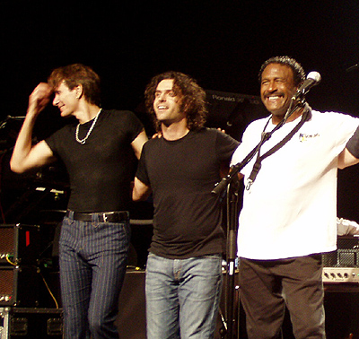 Steve Vai, Dweezil Zappa és Napoleon Murphy Brock a Zappa Plays Zappa 2006-os koncertjén (Budapest, Petőfi Csarnok)